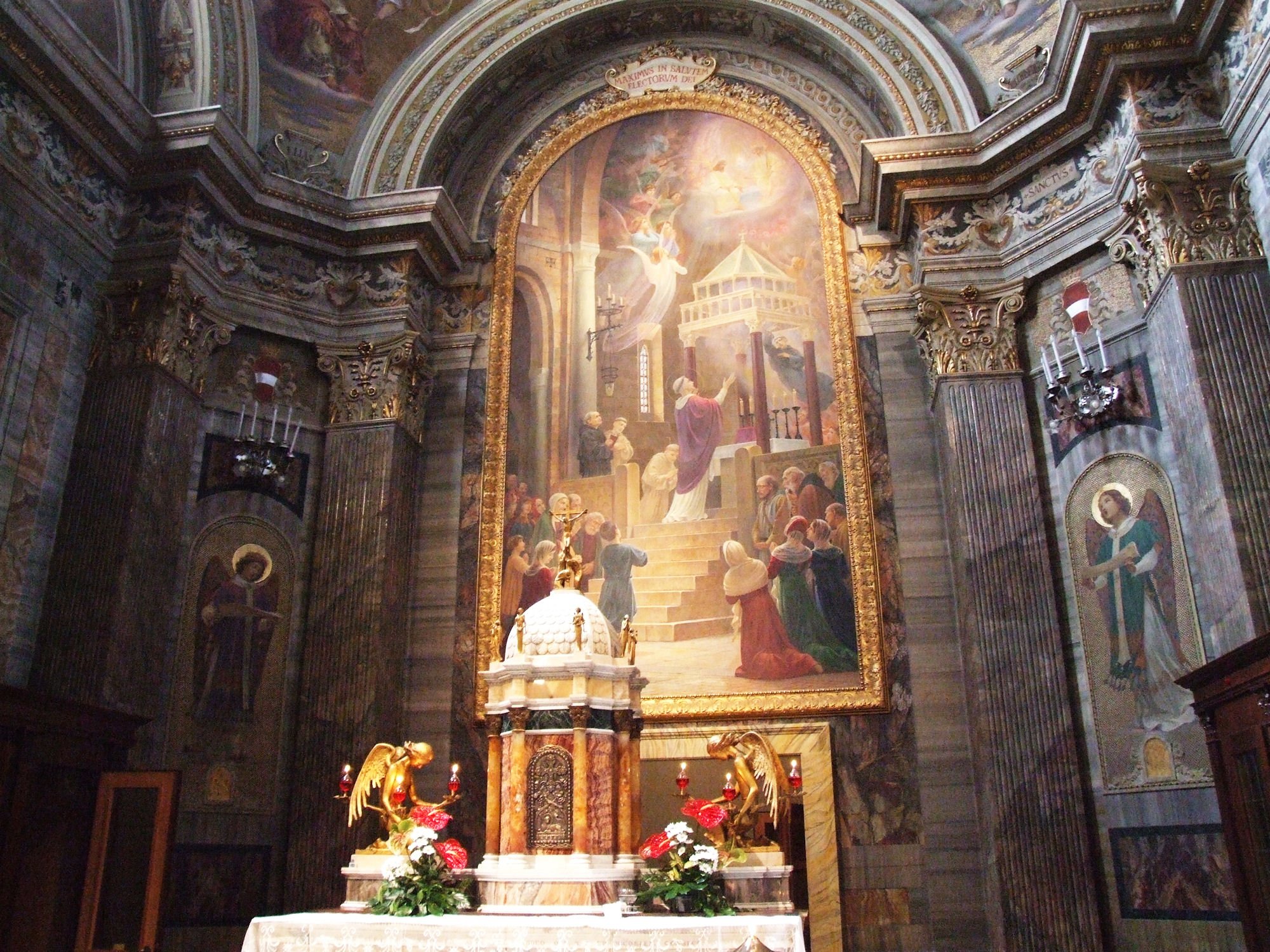 Basilica di San Nicola da Tolentino, Tolentino, Italy